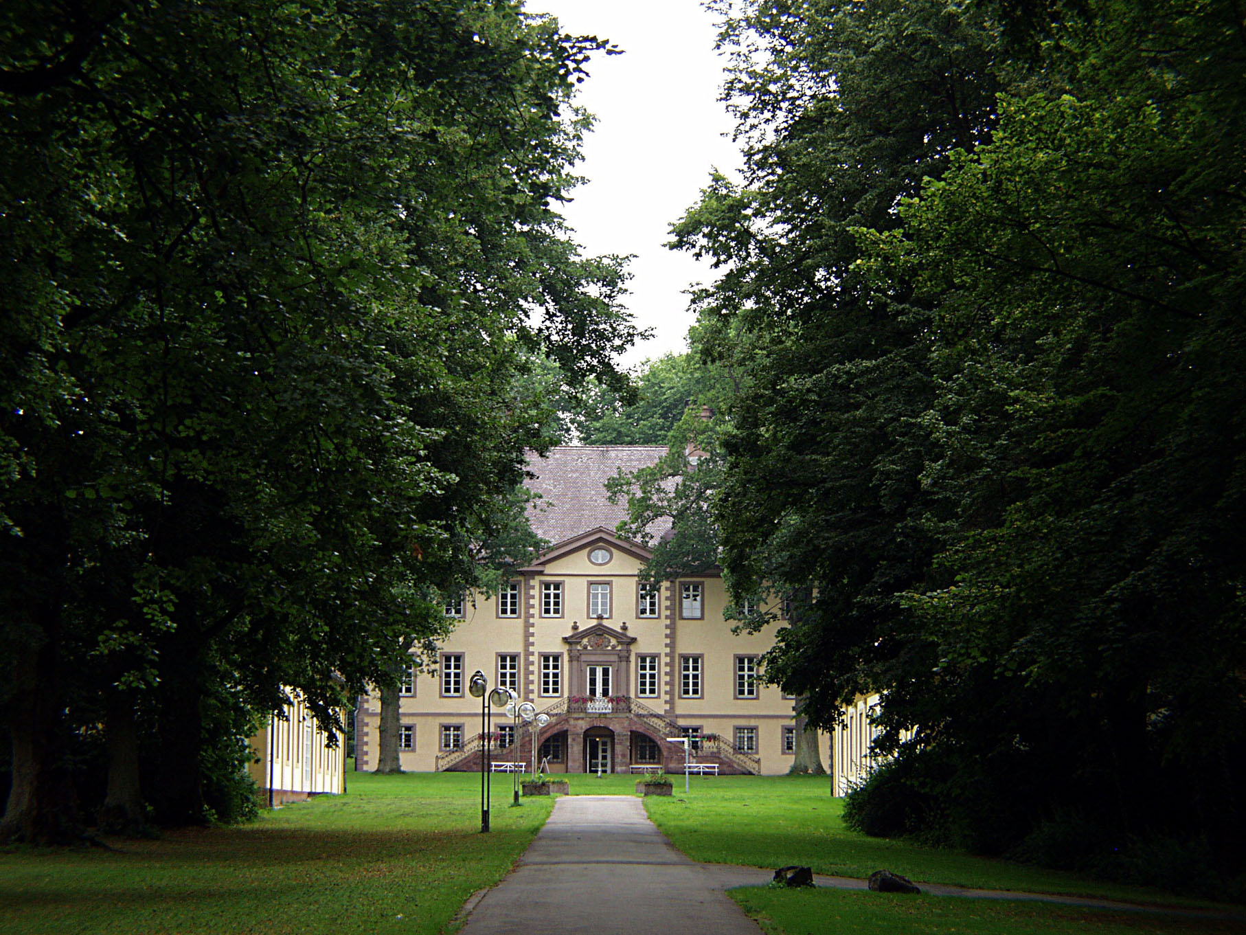 Schloss Schieder in Schieder-Schwalenberg, Nordrhein-Westfalen, Deutschland. – Die Schlossallee in Schieder ist auf einigen hundert Metern Teil des Emmerweges.